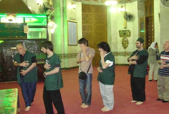 بعض المريدين الألمان أما ضريح إبراهيم الدسوقي يرتدون زي الطريقة الدسوقية الأخضر.